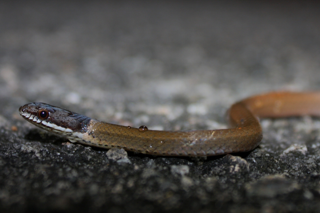 Taken in Sai Kung West Country Park.